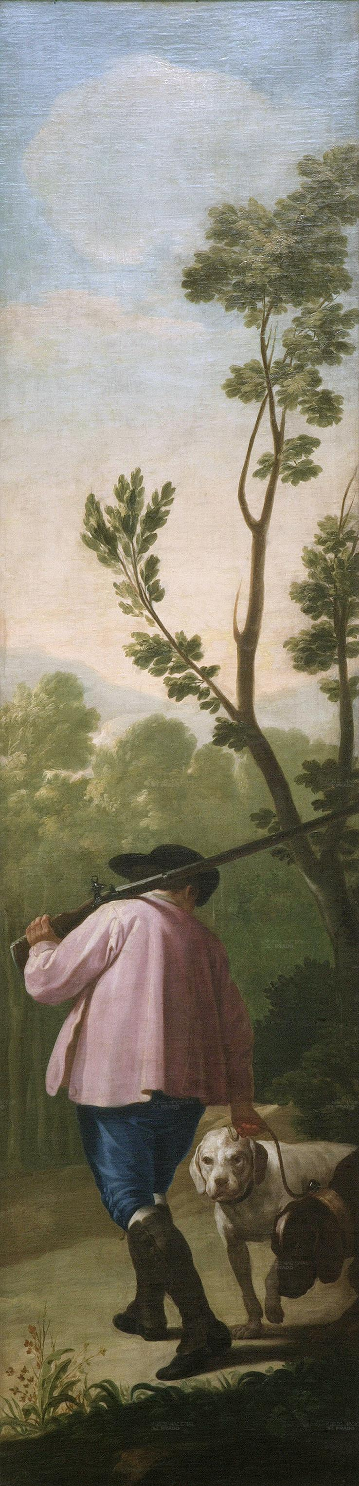 Cartones para tapices.